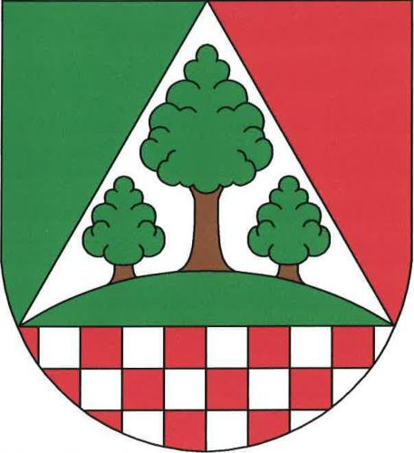 Mžany, znak obce